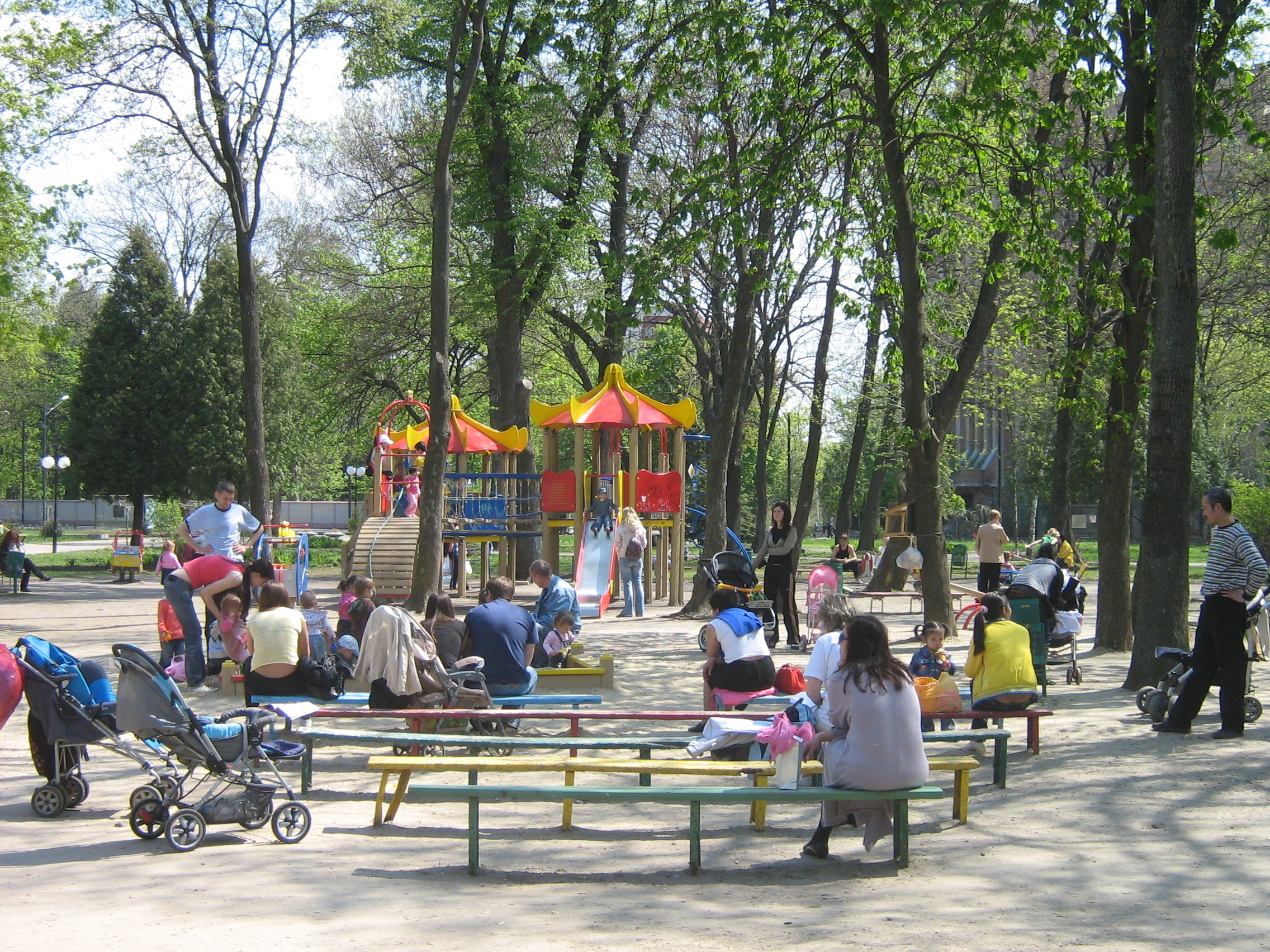 Молодежный парк в Харькове. Весна 2010 года.